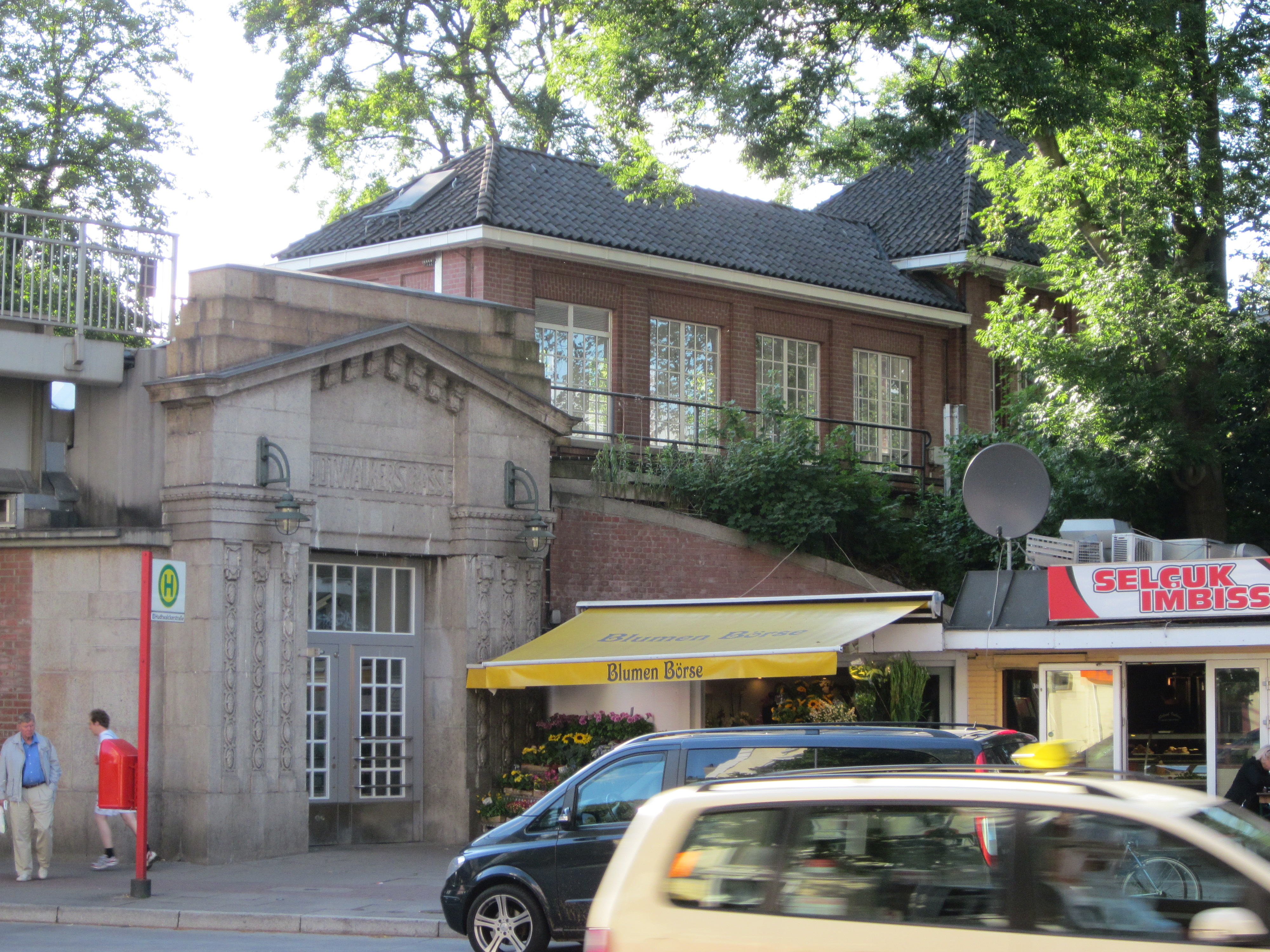 Die U-Bahnhaltestelle Hudtwalckerstraße an der Linie U1 der U-Bahn Hamburg ist als typischer Backsteinbau noch im Ursprungszustand erhalten.